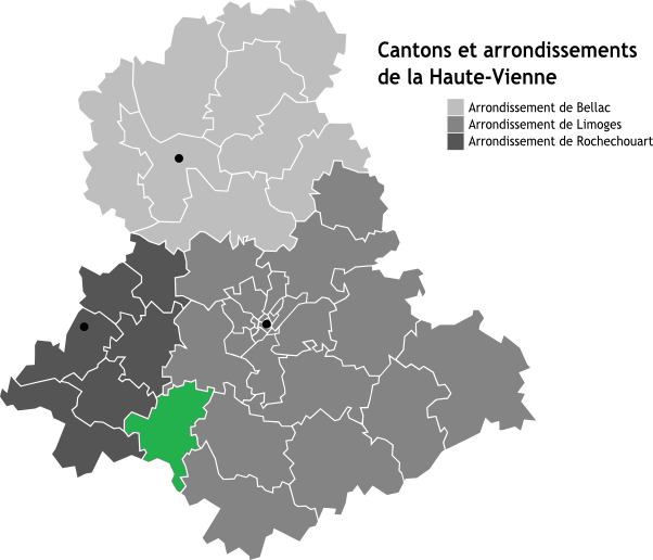 Canton de Châlus, Limousin, France en Carte des arrondissements de la Haute-Vienne